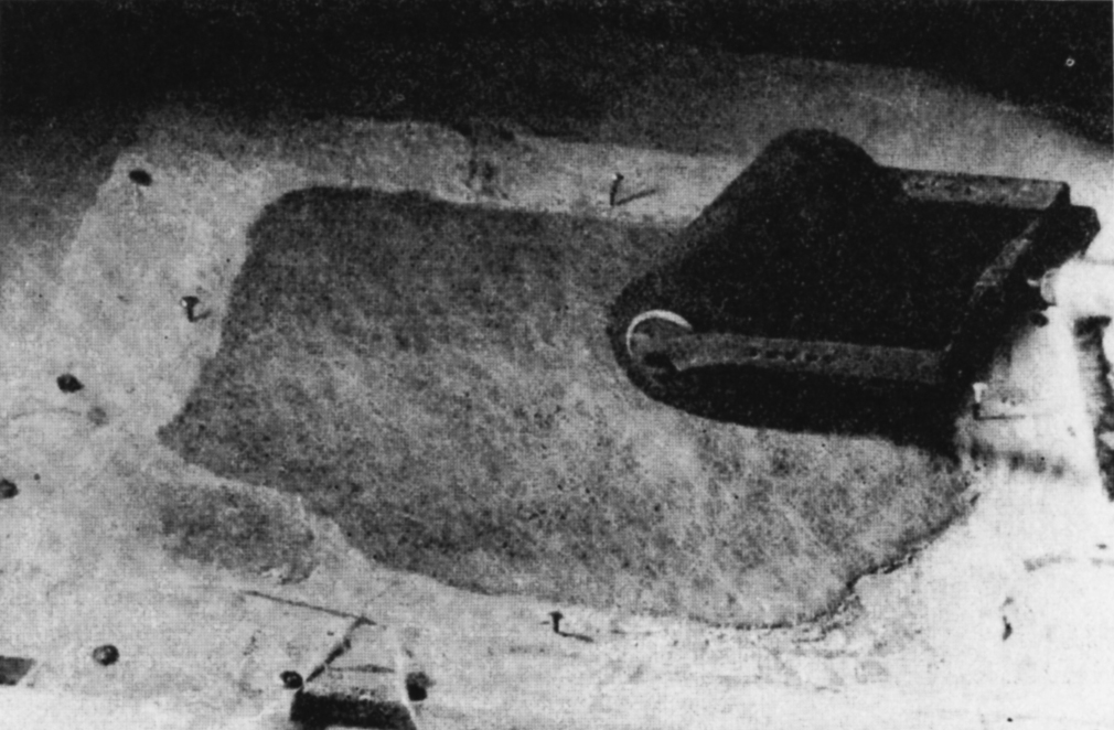 Prace konserwatorskie przy malowidłach z Faras w Muzeum Narodowym w Warszawie. Wzmacnianie oryginalnej warstwy jednego z malowideł - naklejanie welonu